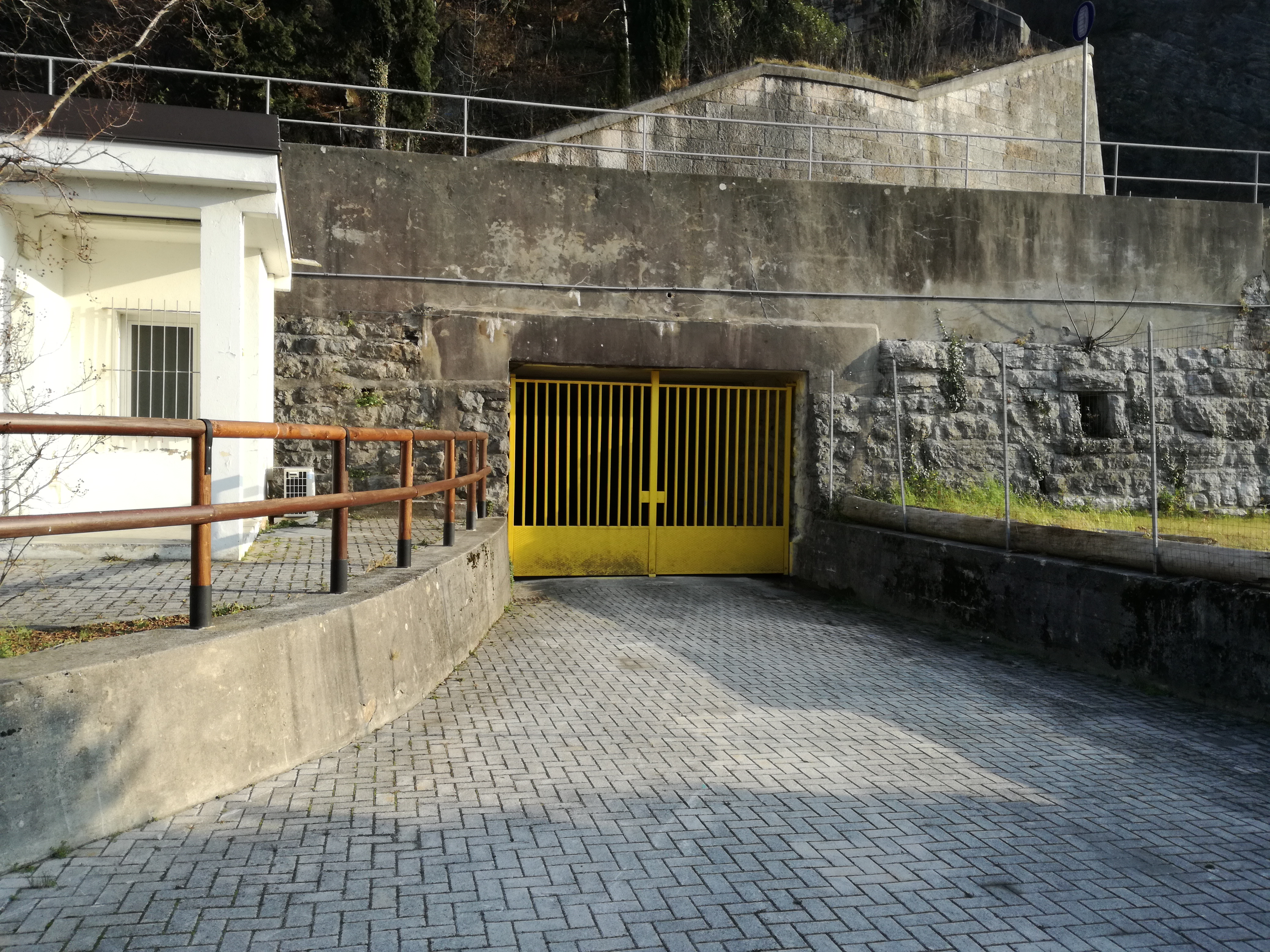 Versorgungstunnel - Etsch-Gardasee-Tunnel